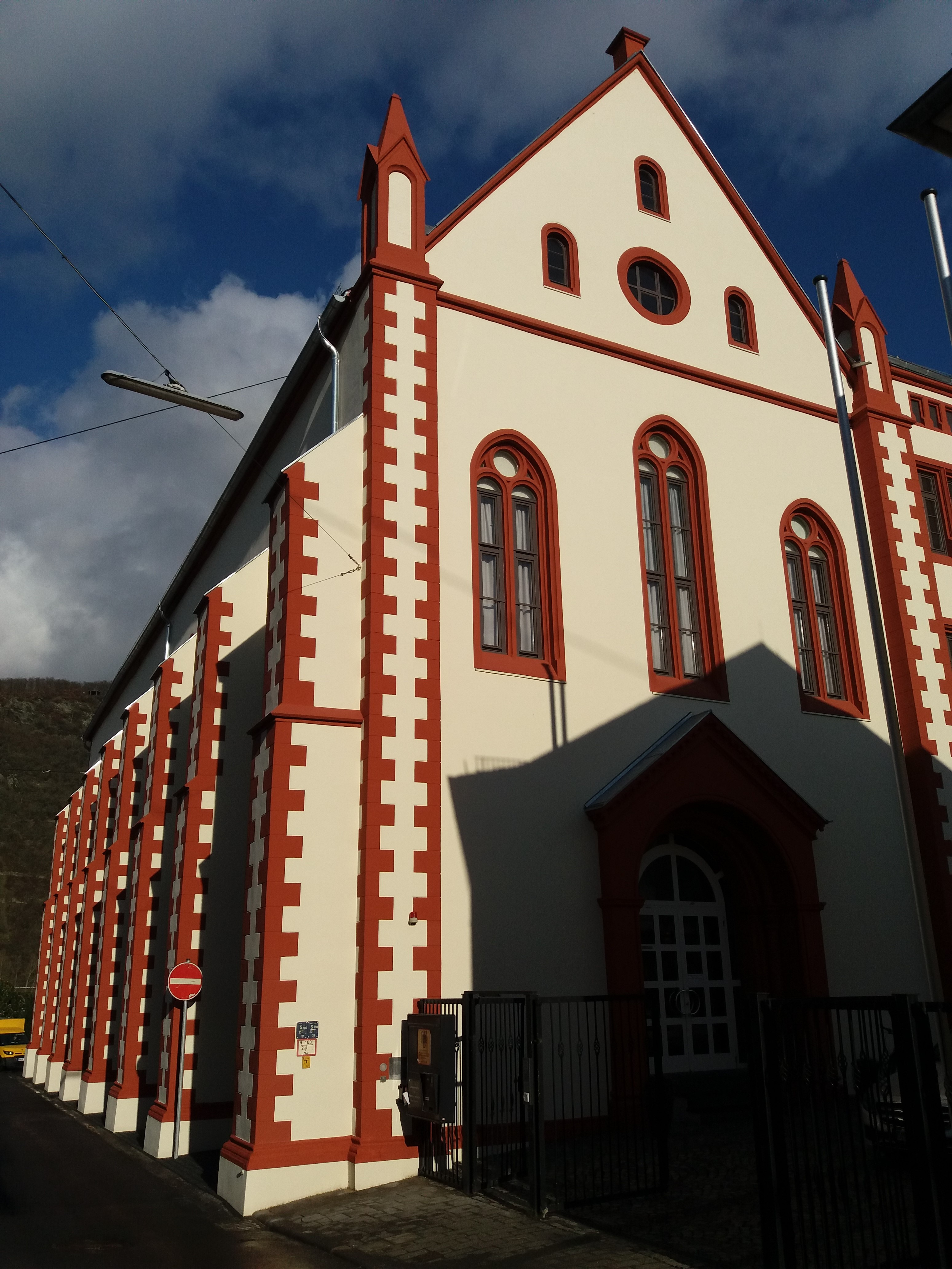 Franziskaner-Kloster Boppard Süd-West-Ansicht